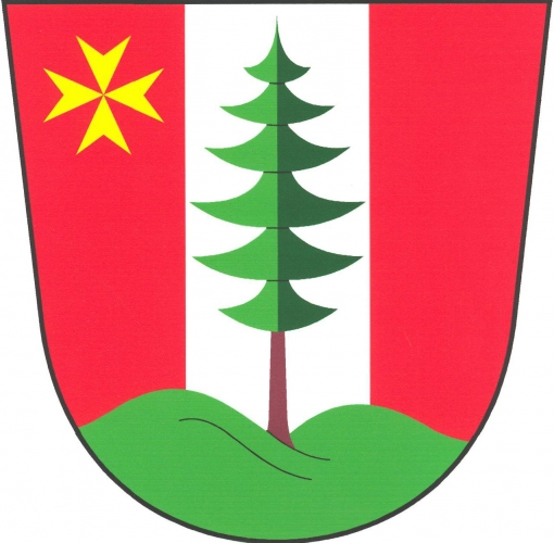 Znak, Jedlí, okres Šumperk